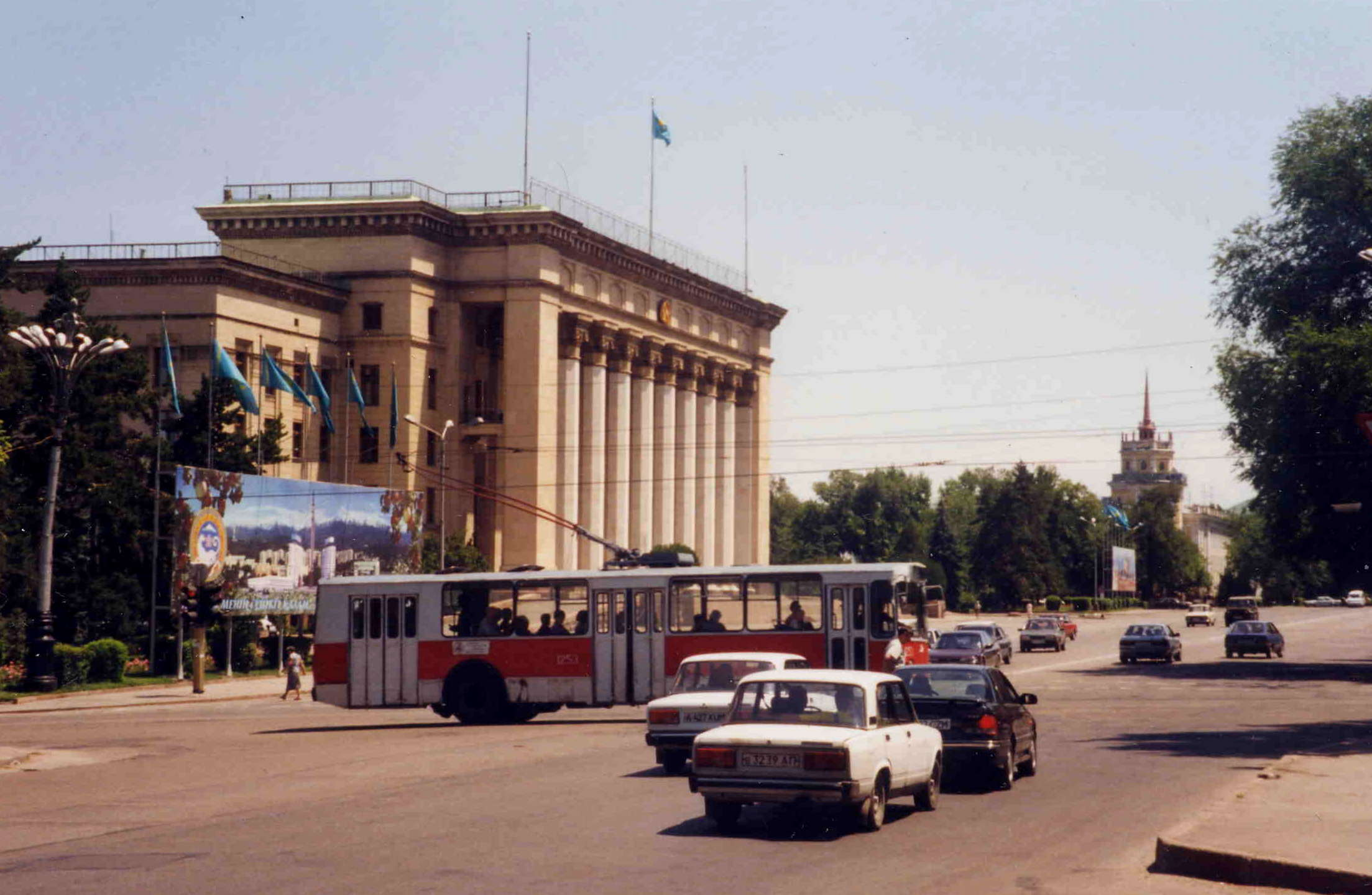 Здание Казахстанско-Британского технического университета (бывшее здание Верховного Совета КазССР)